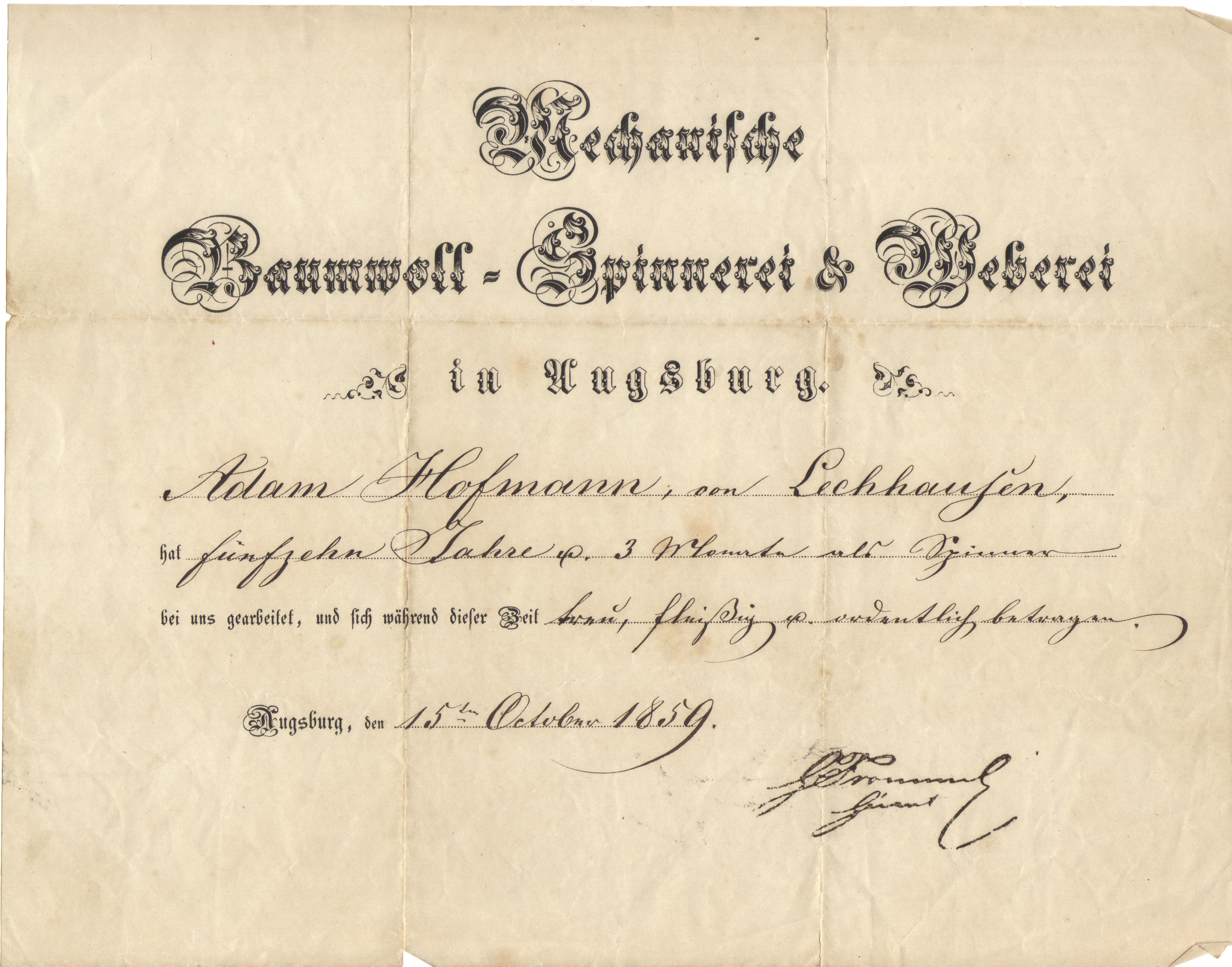 Arbeitszeugnis für Adam Hofmann aus Lechhausen 15.10.1859